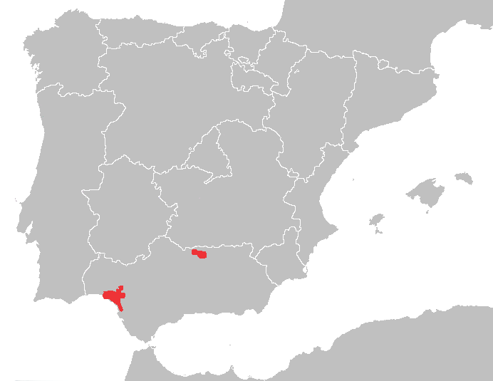 Actualización del mapa de distribución con datos de 2003. Datos publicados por la Consejería de MA. Junta de Andalucía.Proyecto LIFE-Naturaleza "Recuperación de las poblaciones de Lince Ibérico en Andalucía", LIFEO2/NAT/E/8609